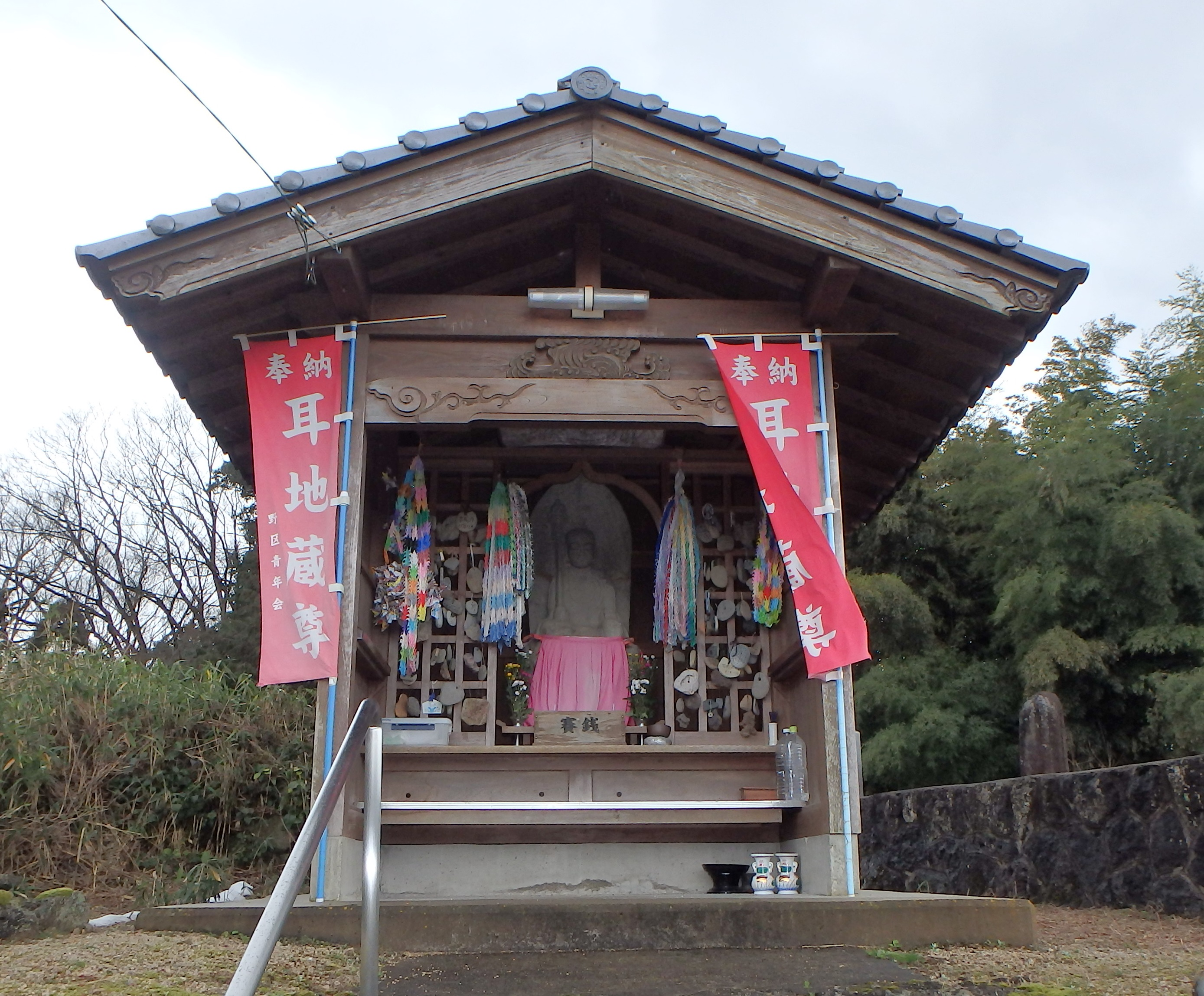 耳地蔵尊を撮影した写真